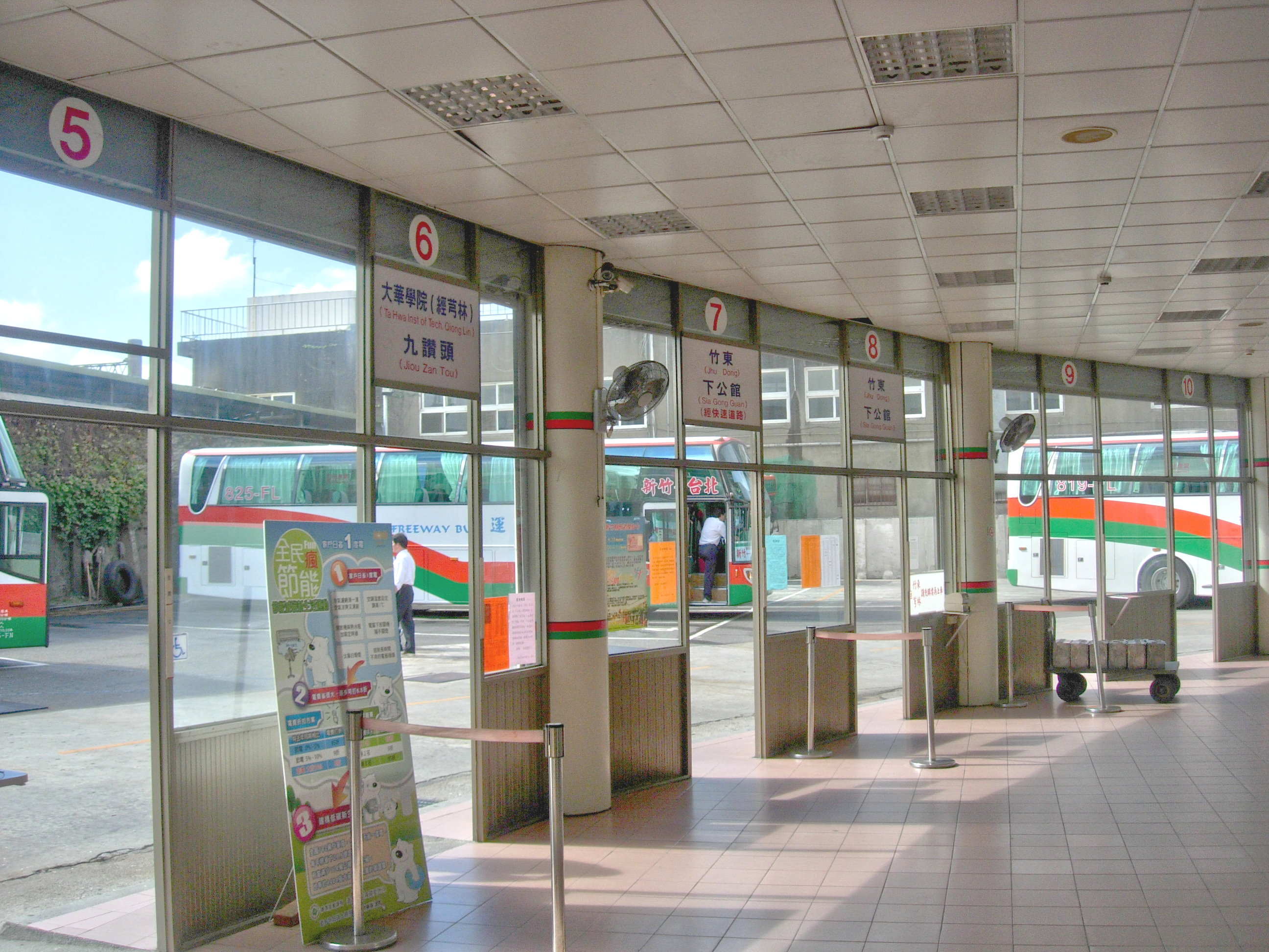 中文（台灣）: 新竹客運新竹總站月台1